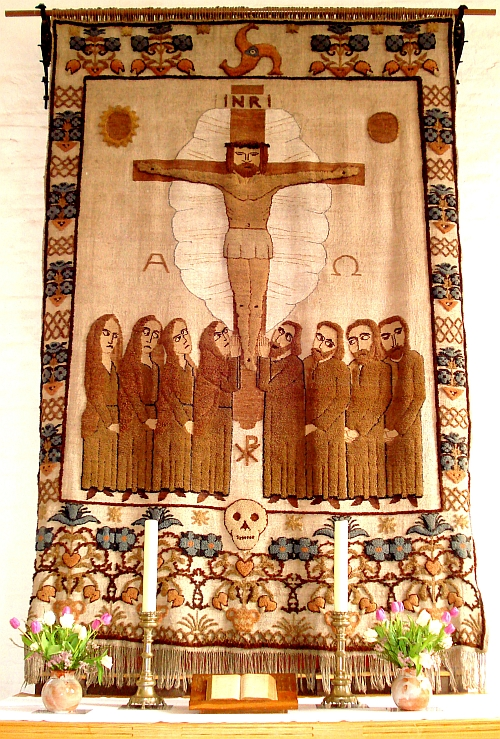 Fischerteppich-Altarteppich Kröslin. Der Altarteppich der Kirche Kröslin. Die Wolle für den 1947/48 geknüpften Teppich wurde mit Naturfarben eingefärbt.